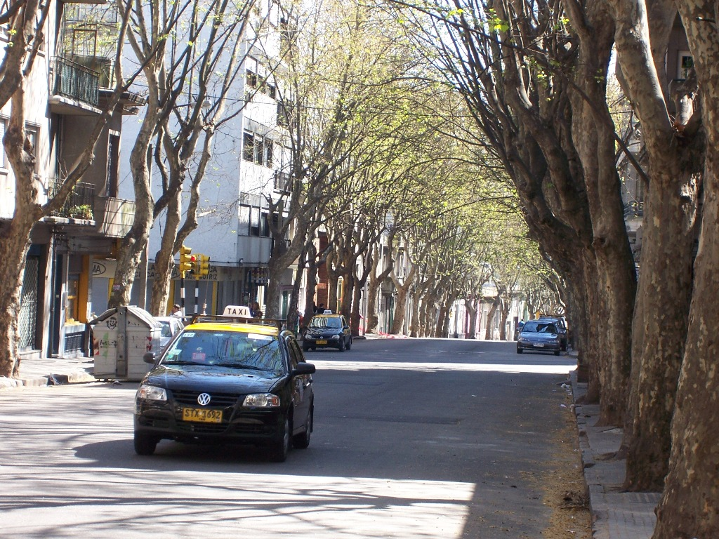 Vista de la calle Dr. Juan Paullier, Barrio Cordón, Montevideo, Uruguay. La imagen se orienta en sentido norte; se observa la intersección con la calle Colonia.